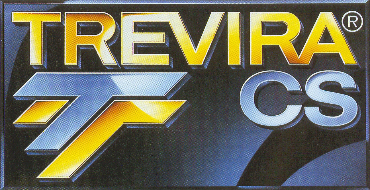 ehemaliges Trevira Logo